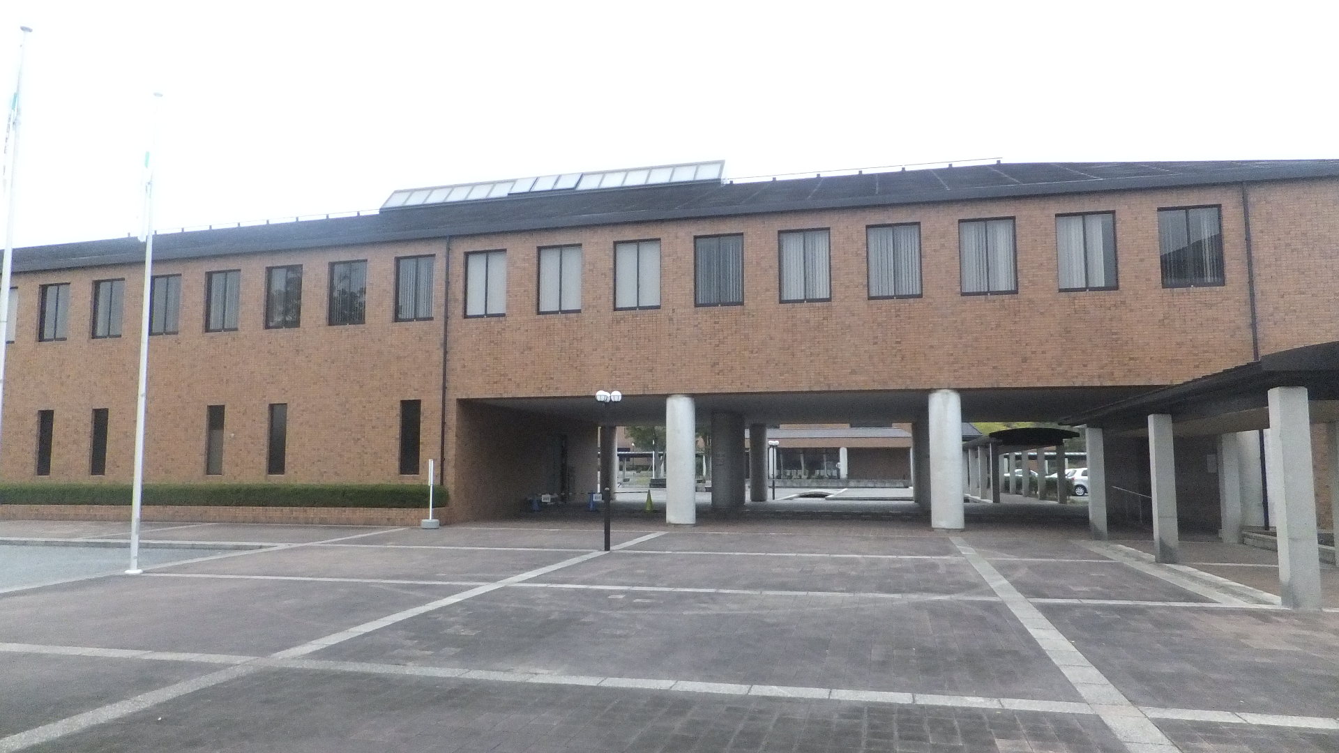 コープこうべ協同学苑 研修棟